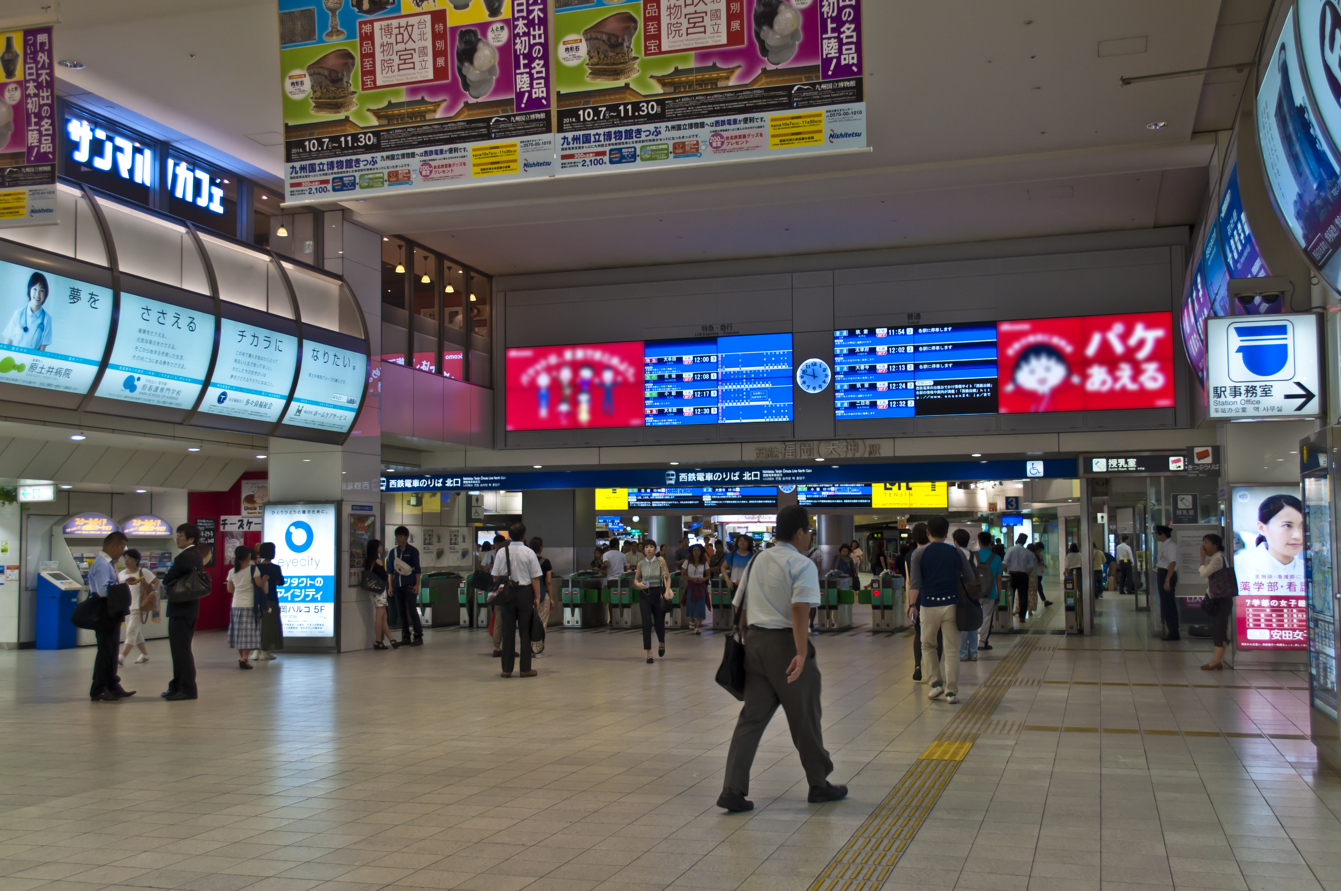 西鉄福岡(天神)駅の北口。一部の広告にぼかし処理を施した。